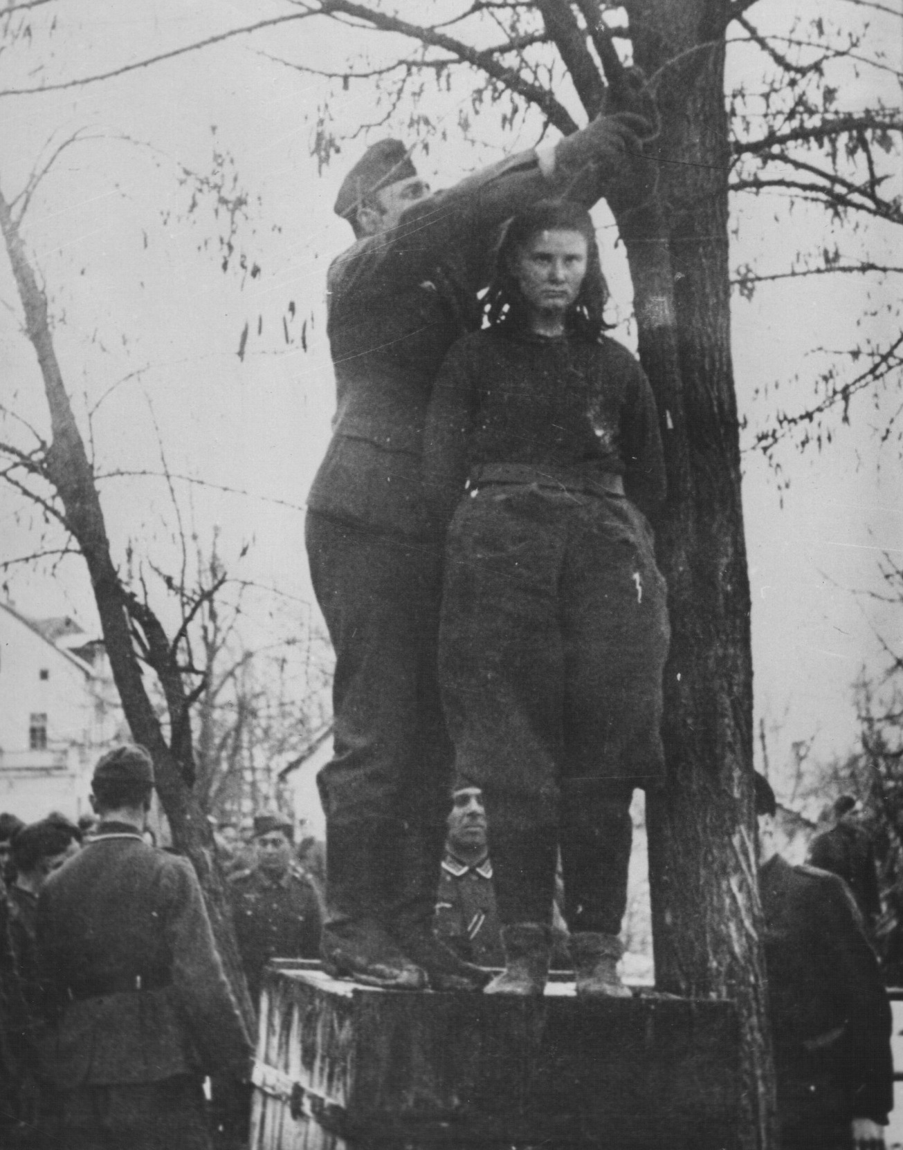 Vešanje Lepe Radić u Bos. Krupi februara 1943